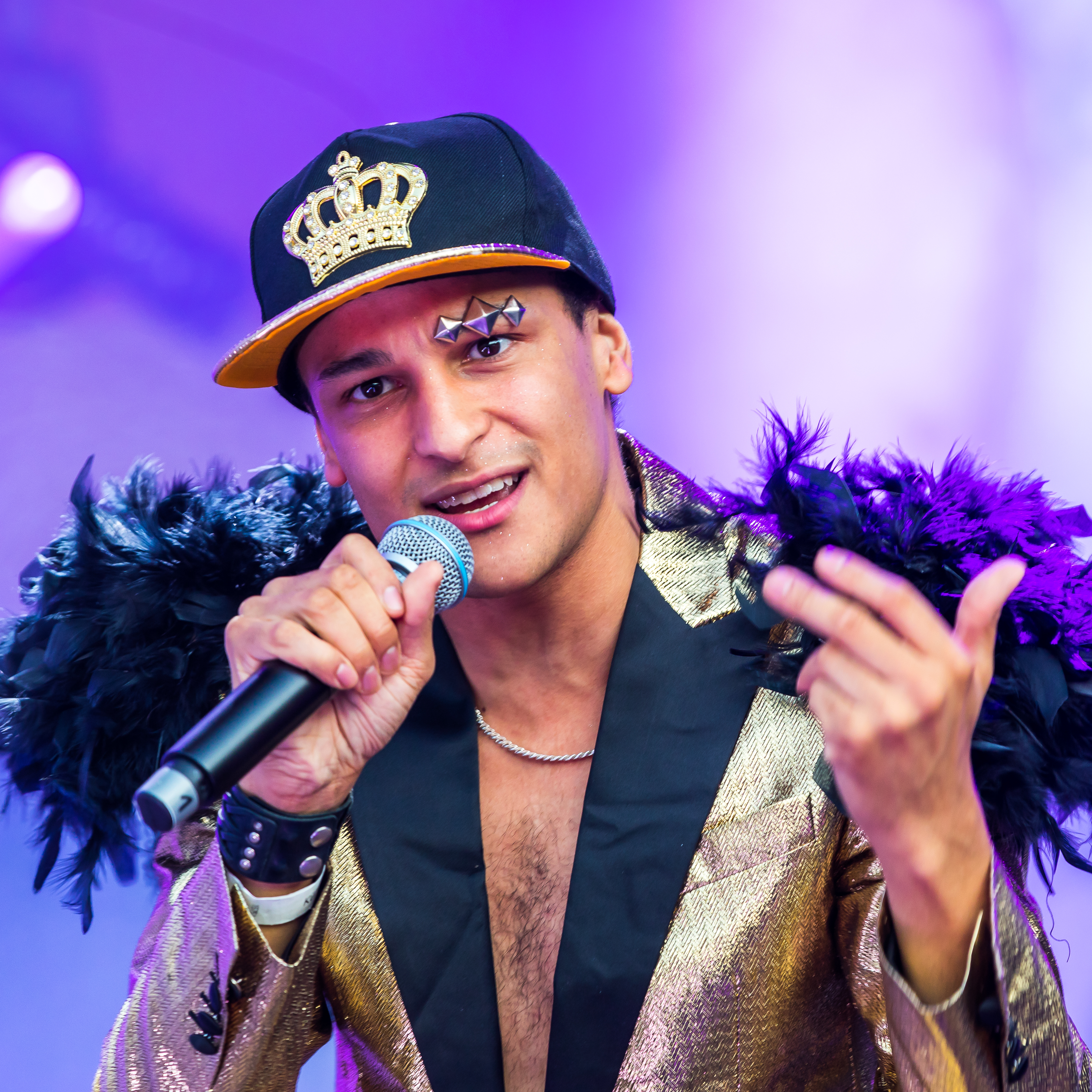 ColognePride/CSD 2018 - Auftritt von Prince Damien auf der Hauptbühne, Heumarkt